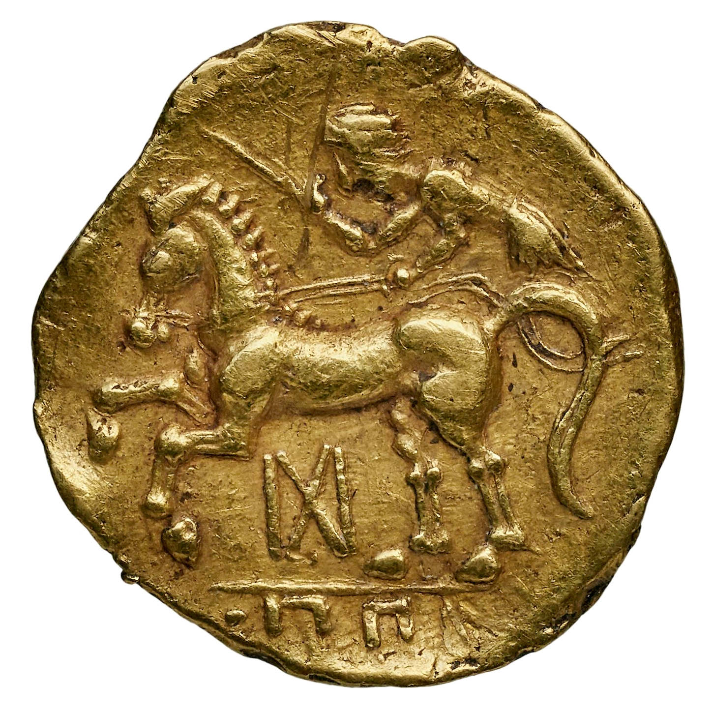 Quart de statère des Unelles. Revers : Aurige guidant un cheval à gauche, symboles en-dessous. Or, 2,11 gr. Diamètre environ 13 mm. vers -100. Collection Bnf : 6940 (Ancien fonds) (GAU-7273)